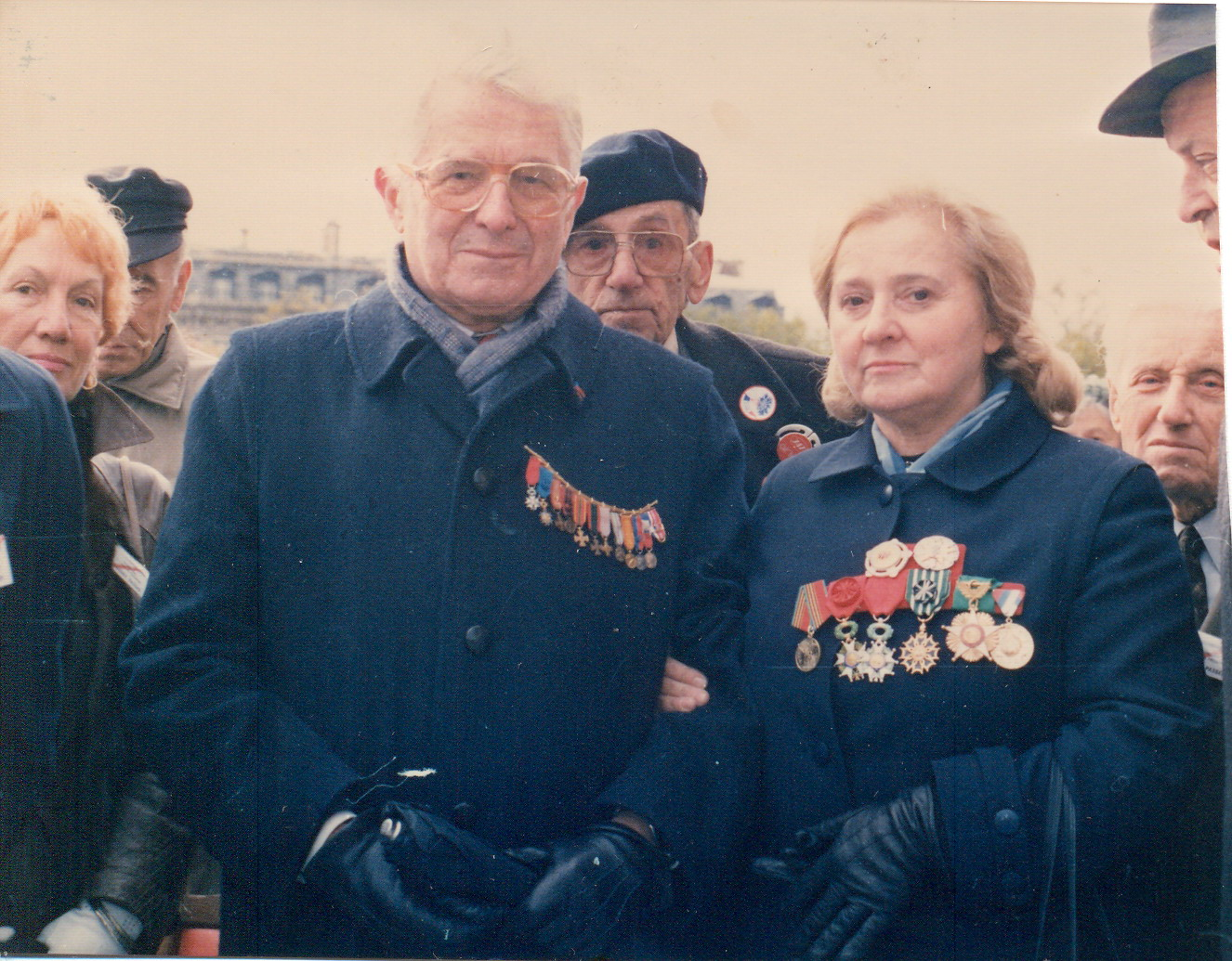 Мира Алечковић и Солунци у Паризу, на Дан победе у Првом светском рату. Уступио Срђа Николић, син Мире Алечковић.